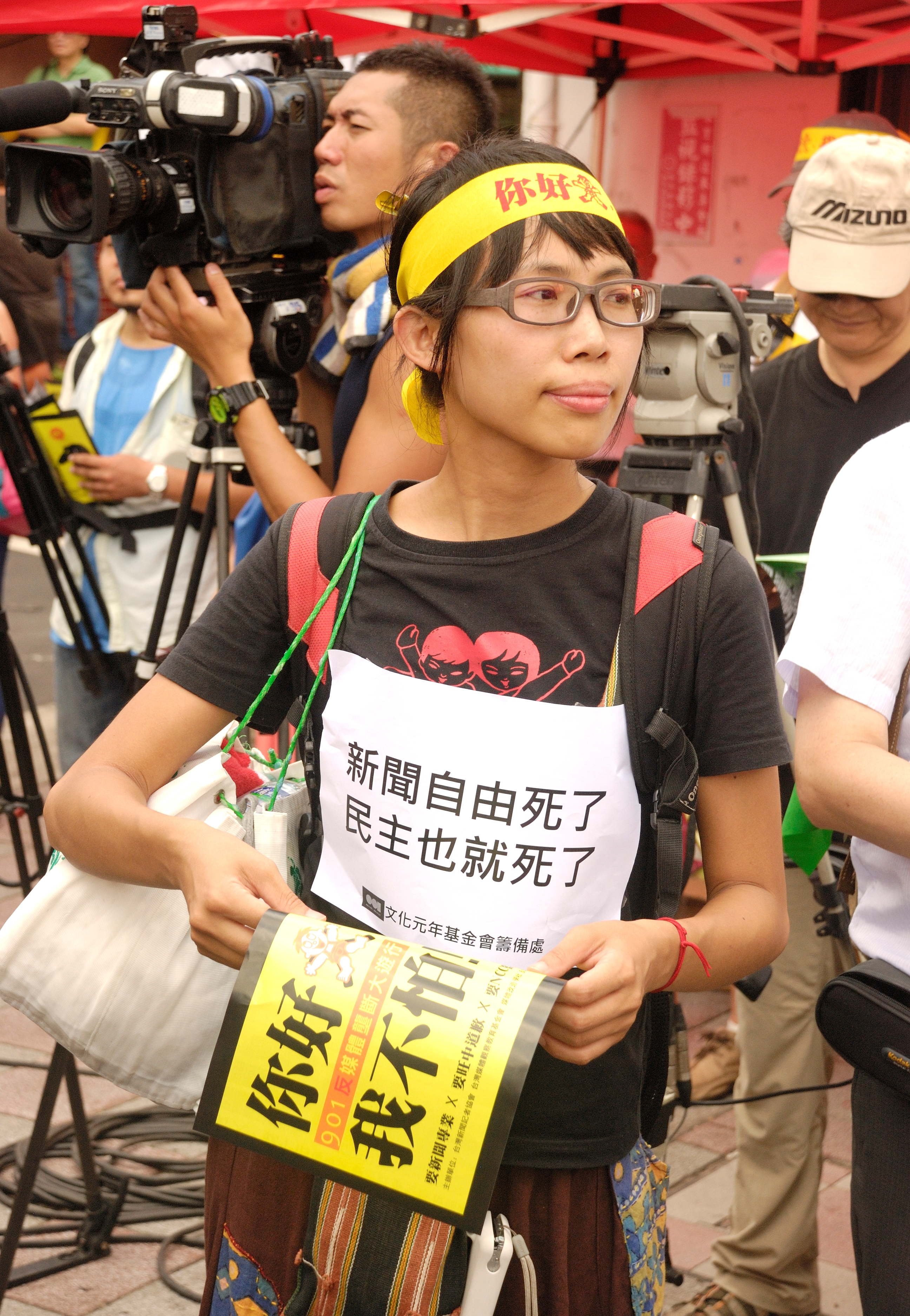 2012/9/1記者節之反媒體壟斷大遊行